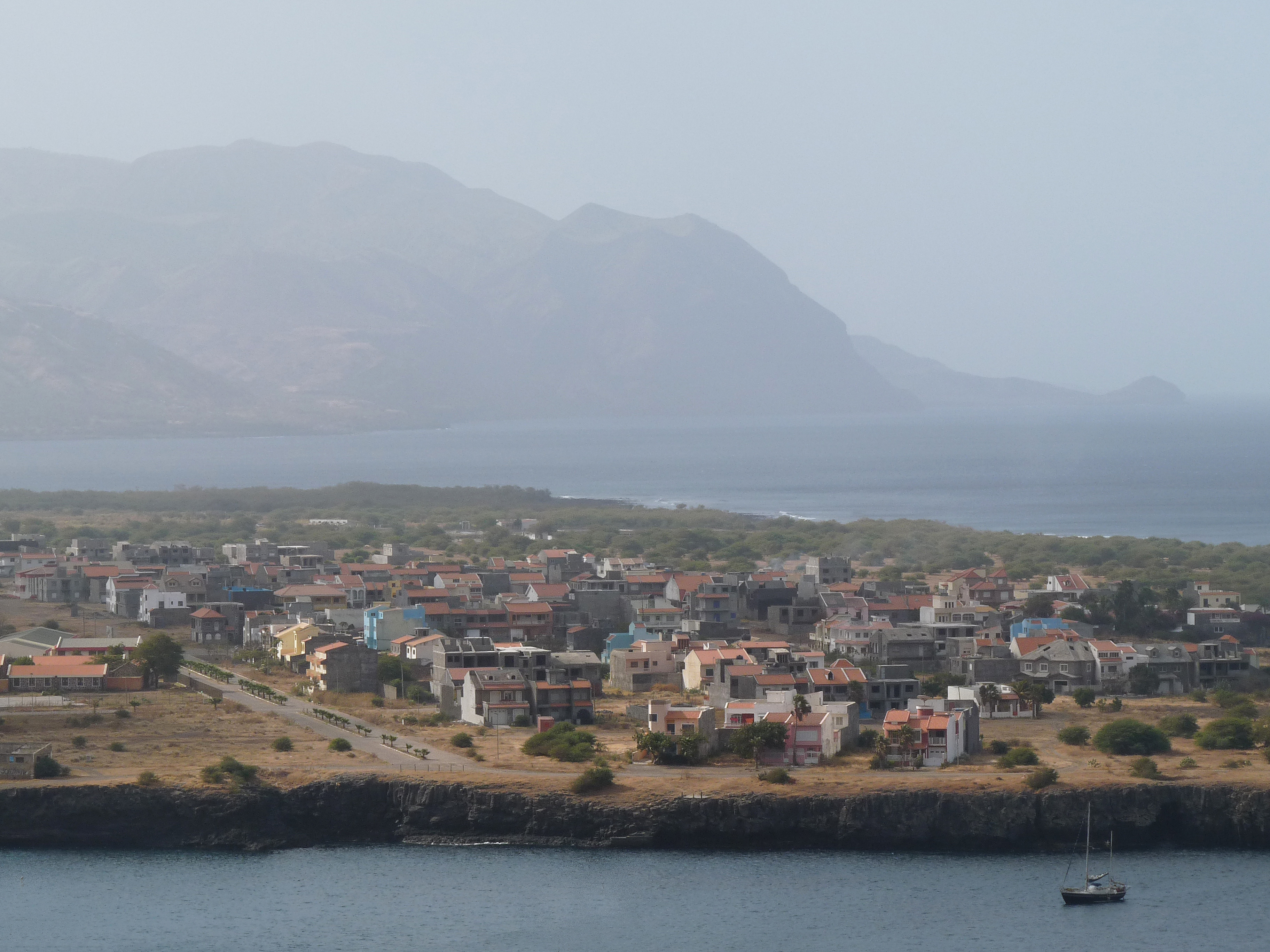 Panorama sur Tarrafal (île de Santiago, Cap-Vert)